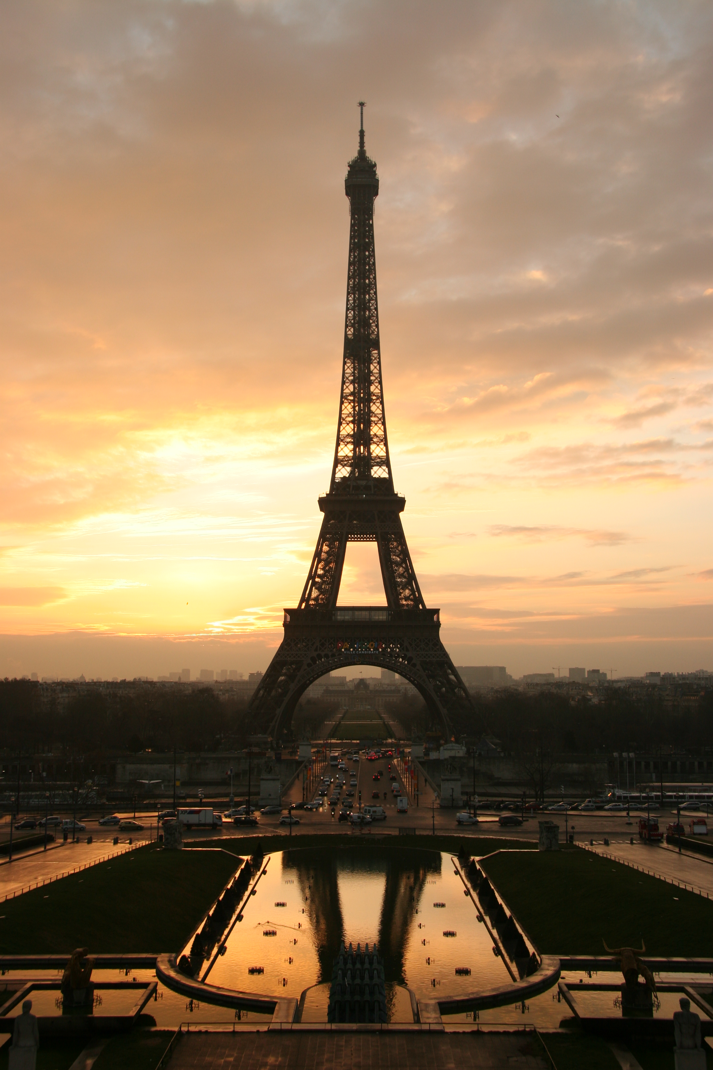 Oʻzbekcha: Parij yodgorliklar Eyffel Minorasi